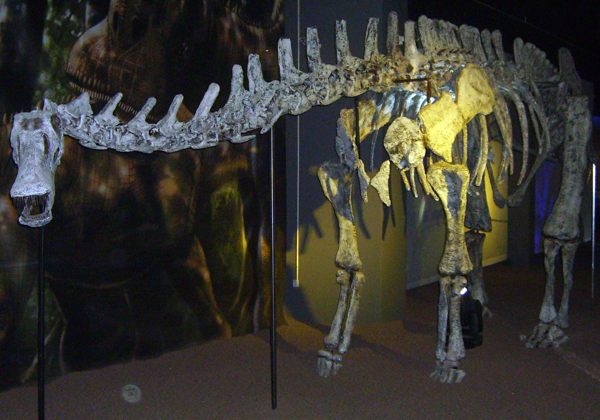 Limaysaurus tessonei skeleton restoration, Copenhagen.